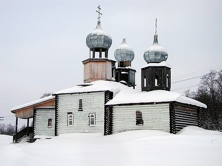 Церковь Успенская (деревянная) (Вологодская область, Вытегра, село Девятины)